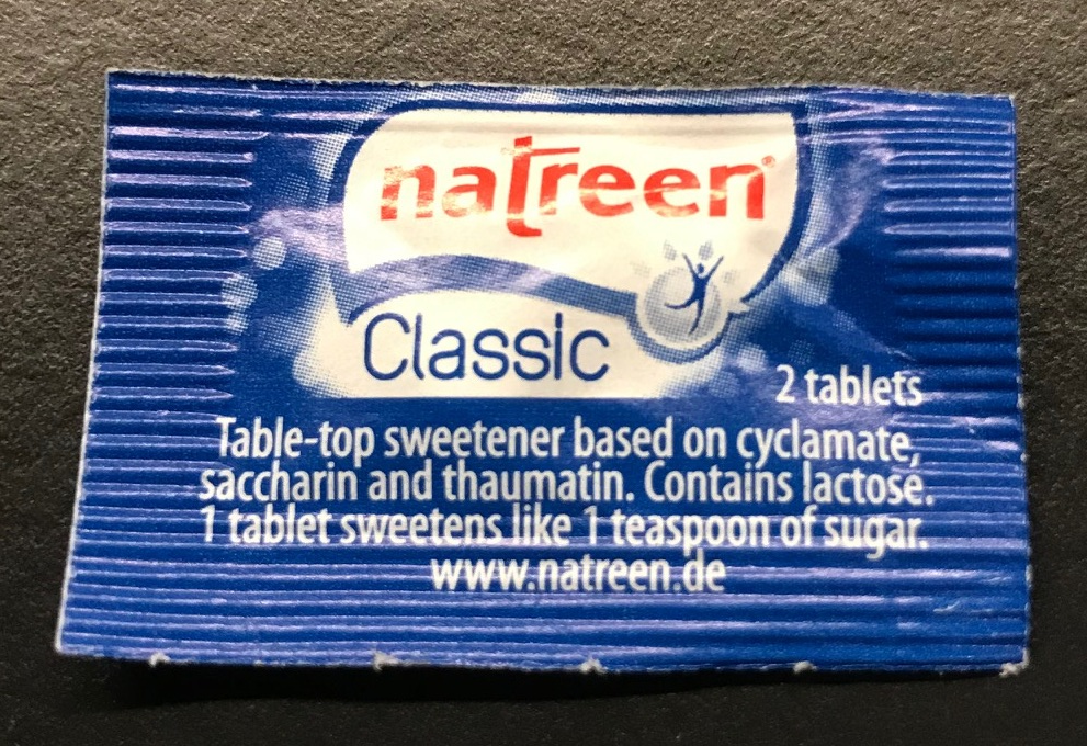 Пример промышленно производимого продукта на основе белка тауматина